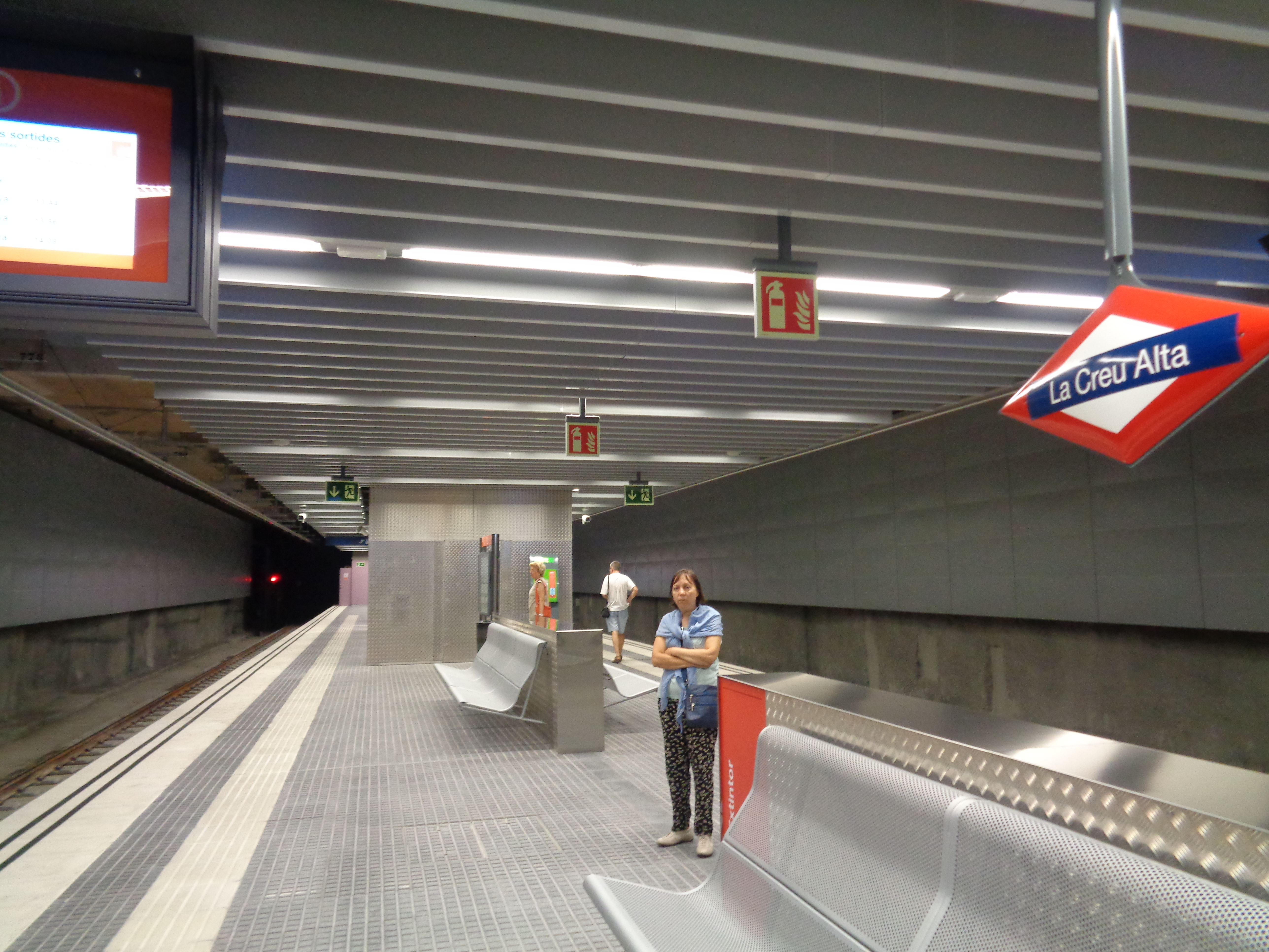 Estació de la Creu Alta a Sabadell.